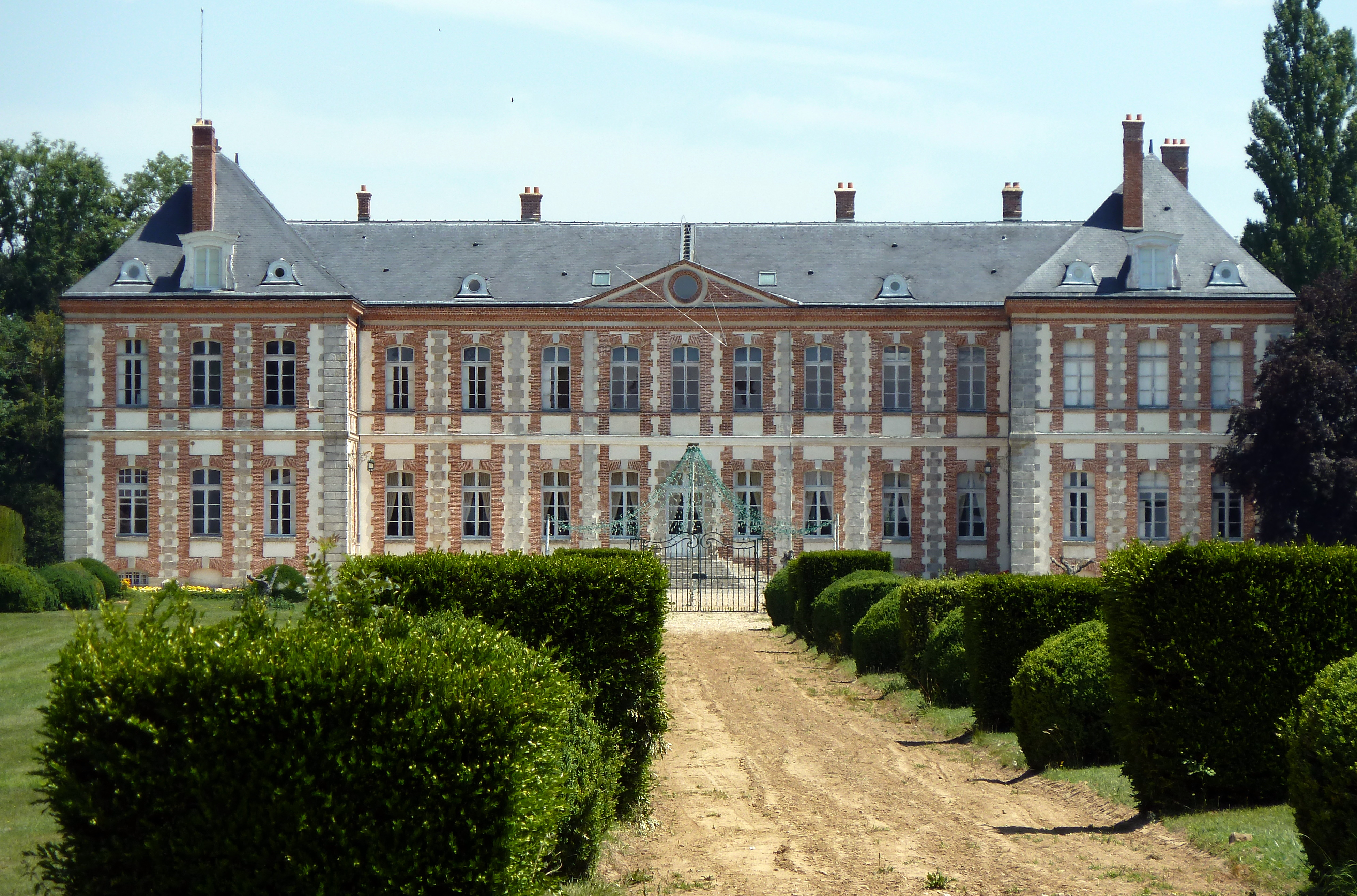 Le château est construit dans un style typiquement français du XVIIe, marqué par des proportions architecturales symétriques et des hautes toitures d'ardoise.